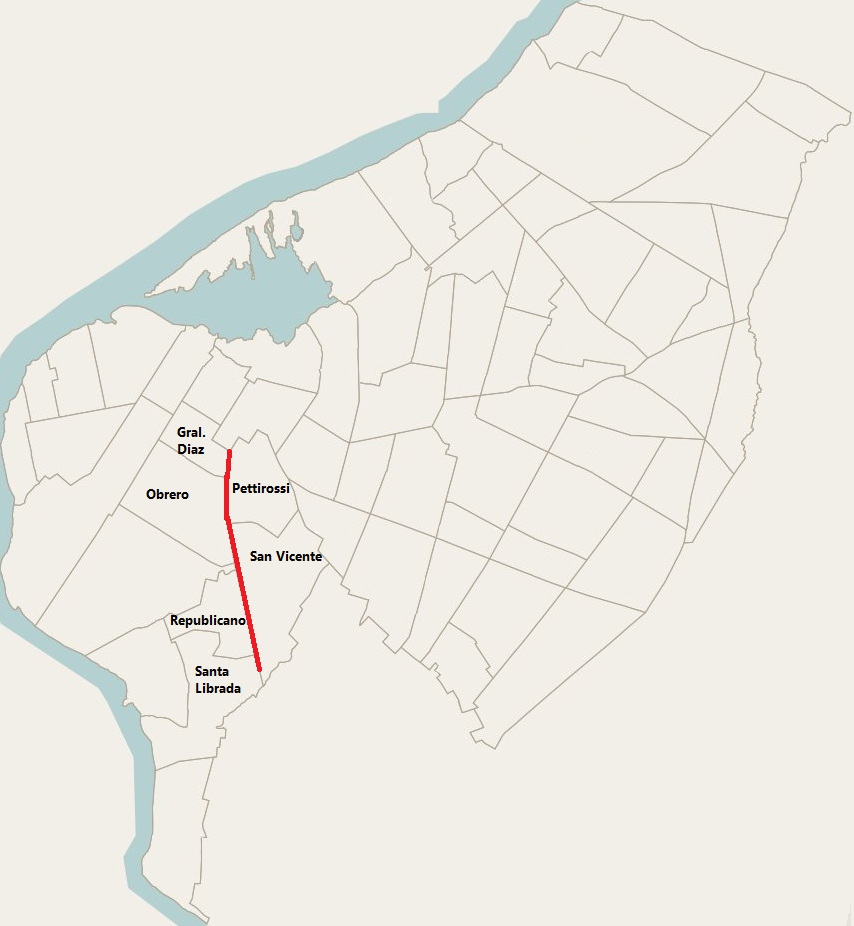 Mapa de la Avenida José Félix Bogado en Asunción, Paraguay